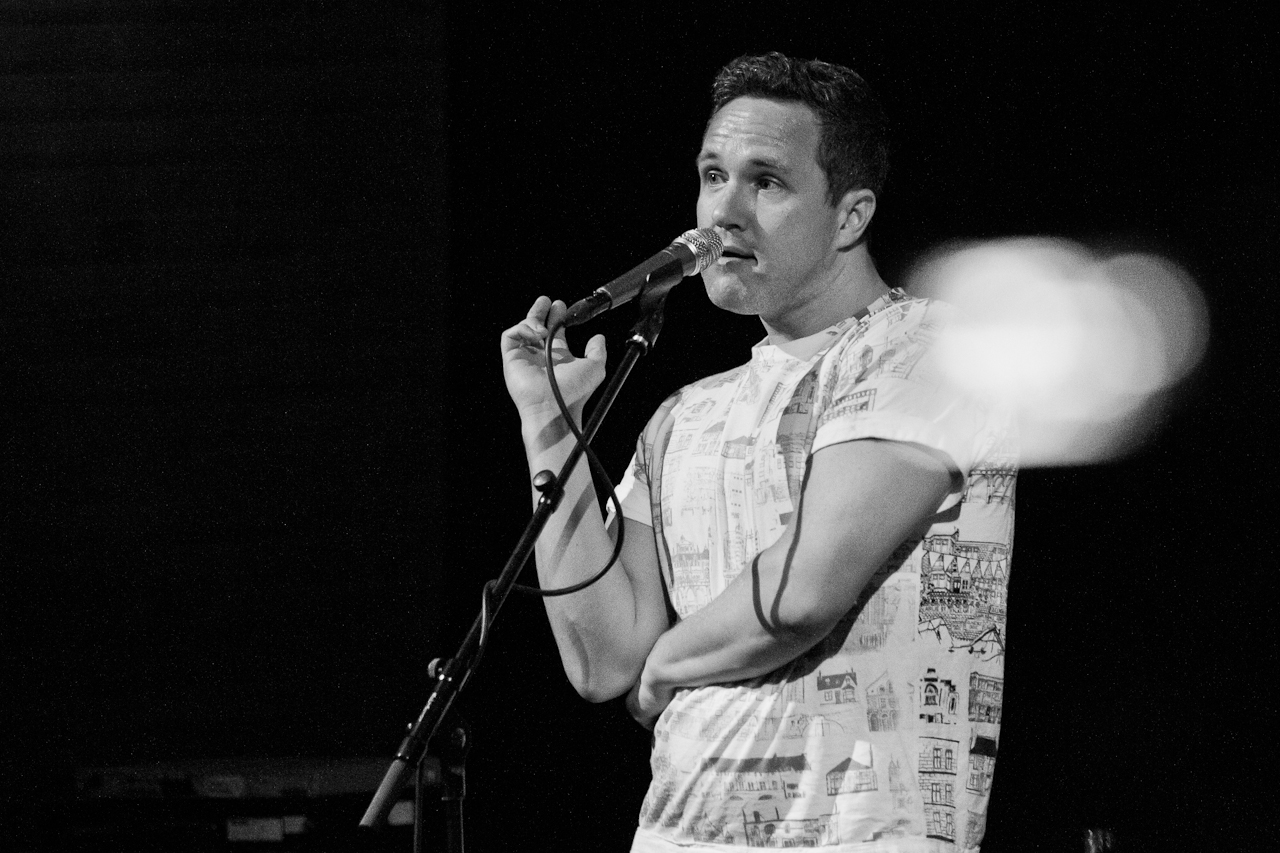 MAČ 2014